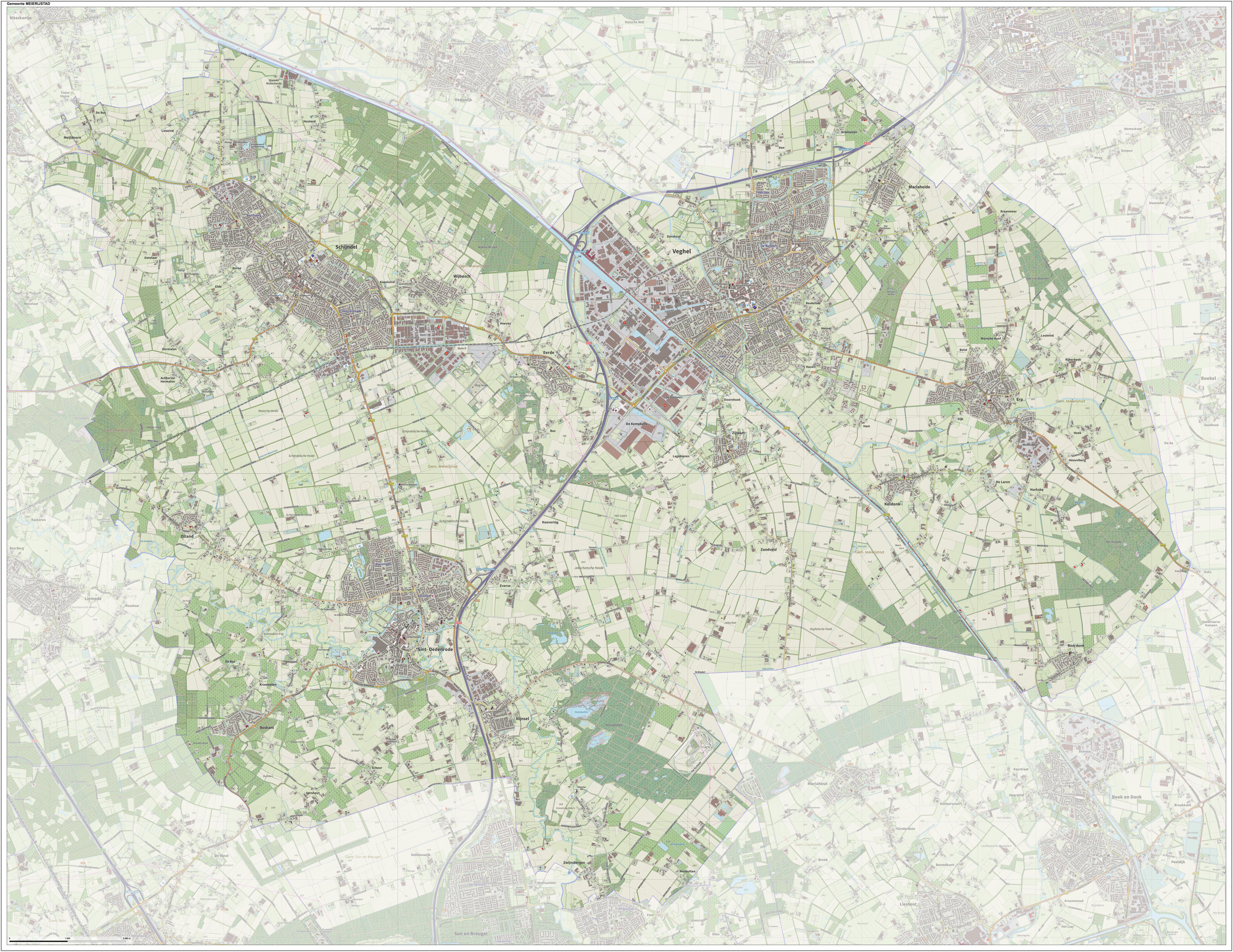 Topografische gemeentekaart. Resolutie: 400 pixels/km. Kaartbeeld samengesteld uit de open geodata van de Top10NL en Top25namen (Kadaster), Creative Commons-BY licentie. Gebouwvlakken uit open geodata BAG extract. Wegen uit de OpenStreetMap, OpenStreetMap community. Reliëfschaduw uit de Actuele Hoogtekaart AHN2.